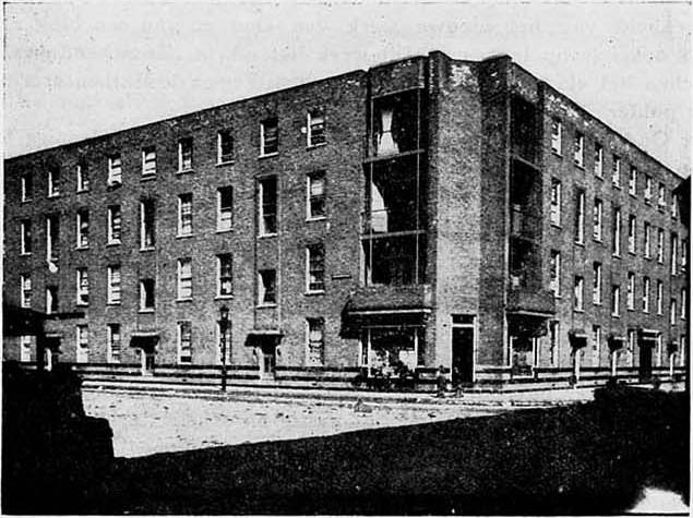 Woningblok, Tussendijken, Rotterdam (architect J.J.P. Oud). 1921 (grotendeels vernietigd 1943). Foto afkomstig uit Bouwkundig Weekblad, 44e jaargang, nummer 36 (28 september 1923): p. 382.